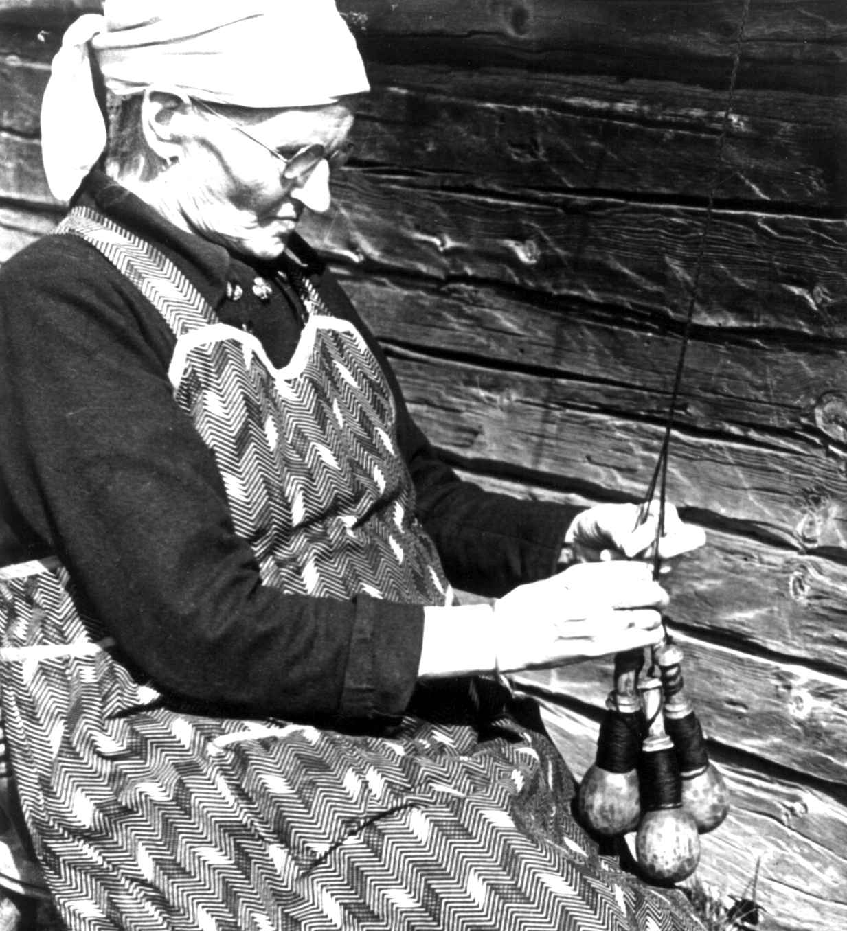 Anne Østby fletter garn til snor/bånd ved hjelp av garnsneller/slingrestokker/slyngestokker. Røros 1939